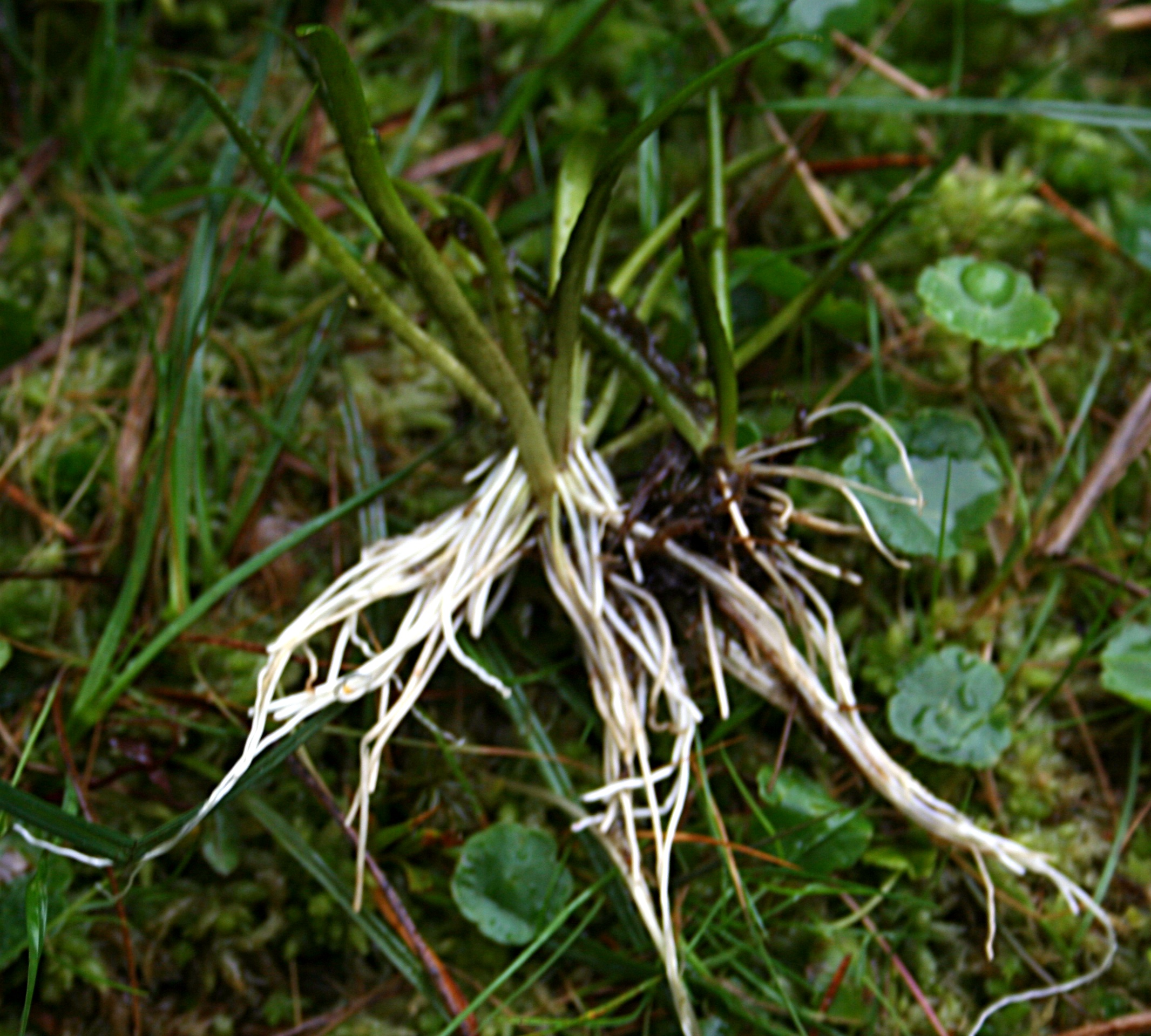 Lobelia jeziorna na jeziorze Modre, powiat bytowski - system korzeniowy rośliny wypłukanej przez wodę